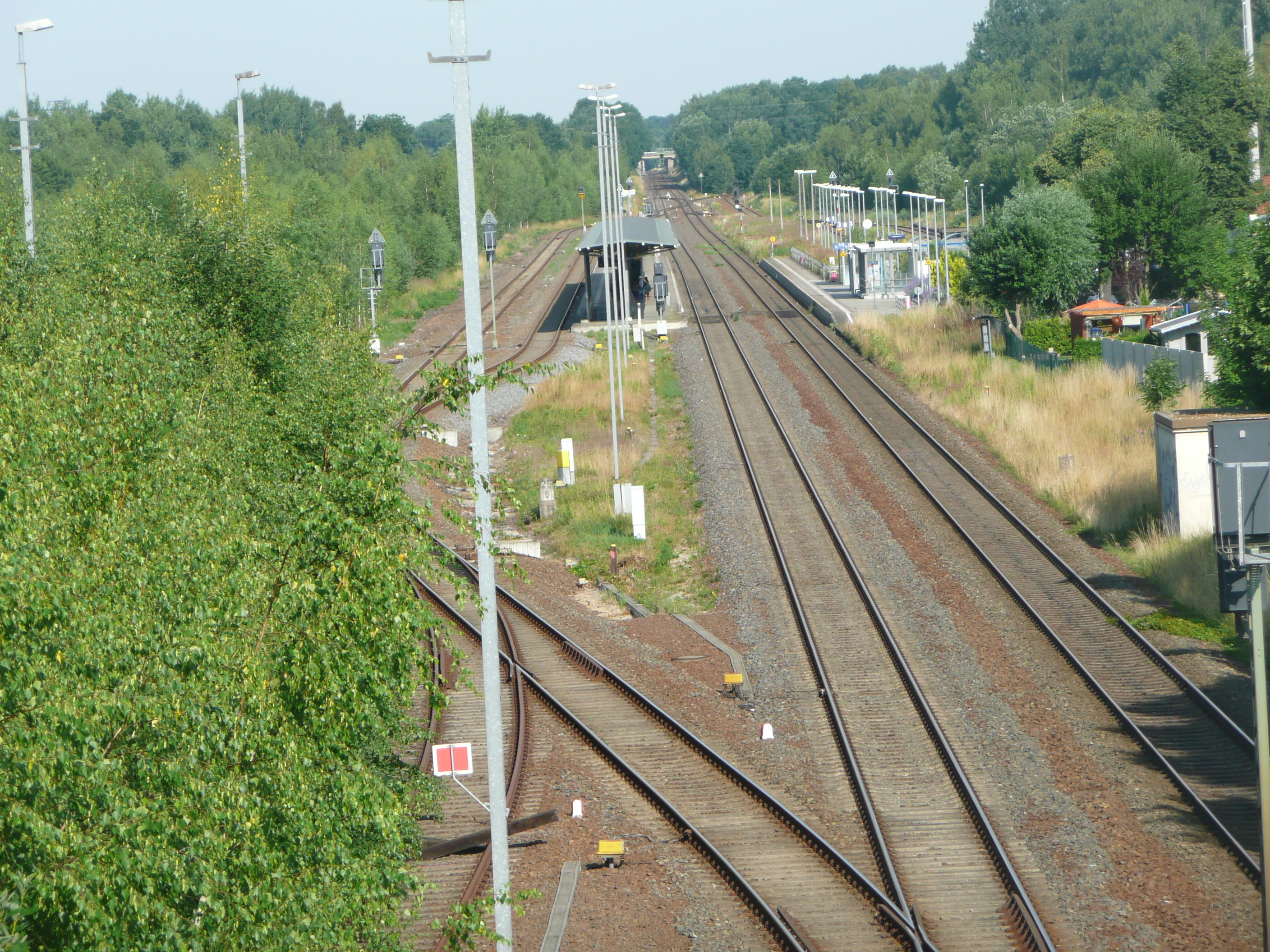 Oststeite des Bahnhofes Arnsdorf